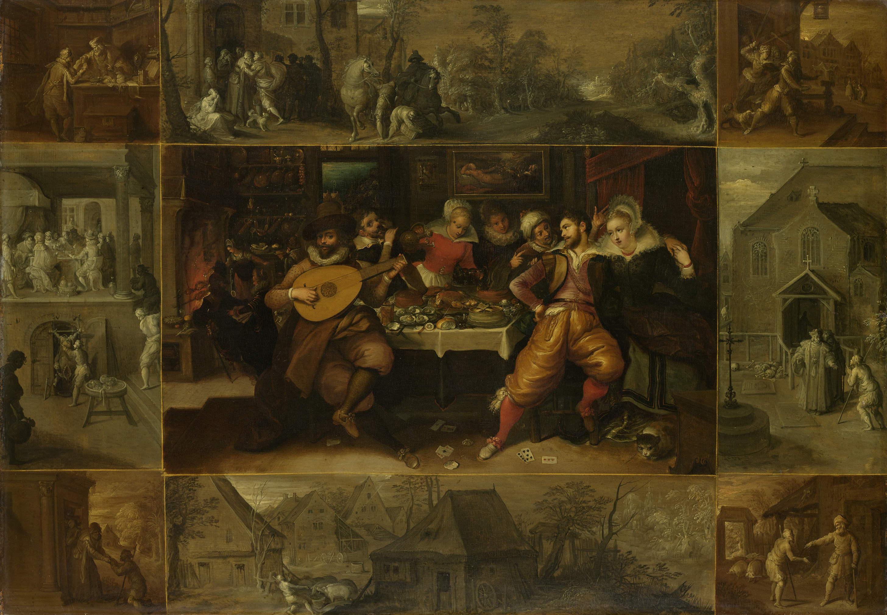 De geschiedenis van de verloren zoon. De centrale voorstelling toont de Verloren Zoon die zijn erfenis spendeert in het bordeel met vrouwen, muziek, eten en drinken. Links aan de tafel een man met een luit. Rechts de Verloren Zoon met zijn arm om een vrouw aan de rand van een bed. Op tafel pasteien en oesters, op de grond liggen speelkaarten. Een vrouw schenkt wijn in roemers. Voor de haard worden vogels aan het spit geroosterd. Aan de muur een schilderij van Jupiter en Danaë. Hieromheen in acht scènes de andere episoden uit de parabel.